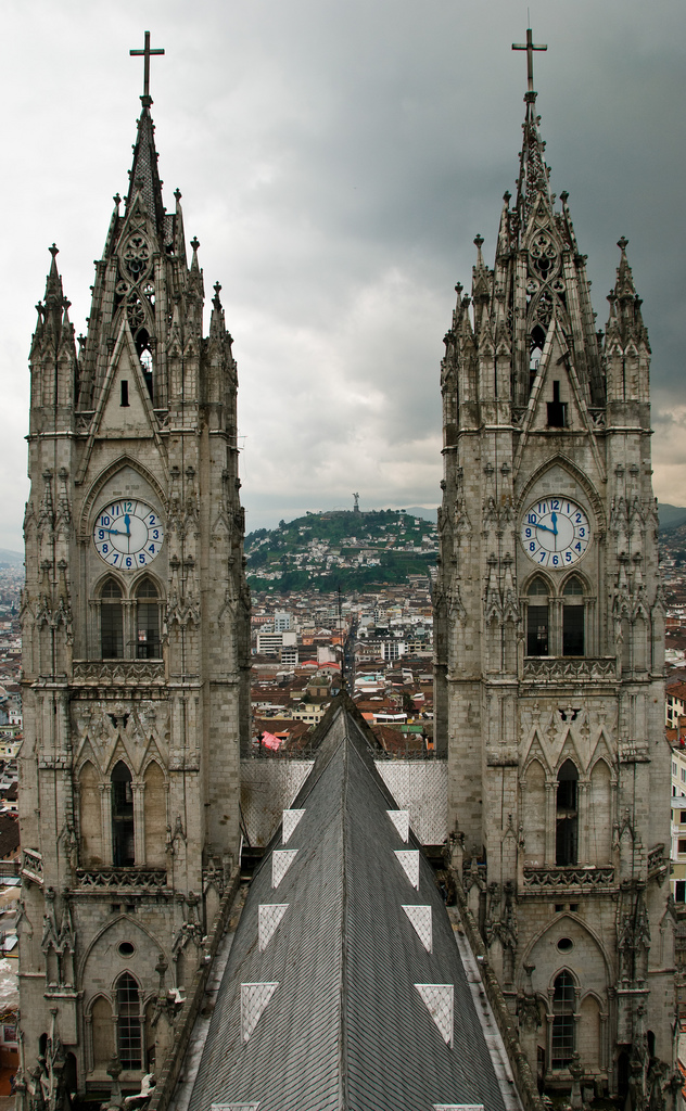 basilica del voto nacional